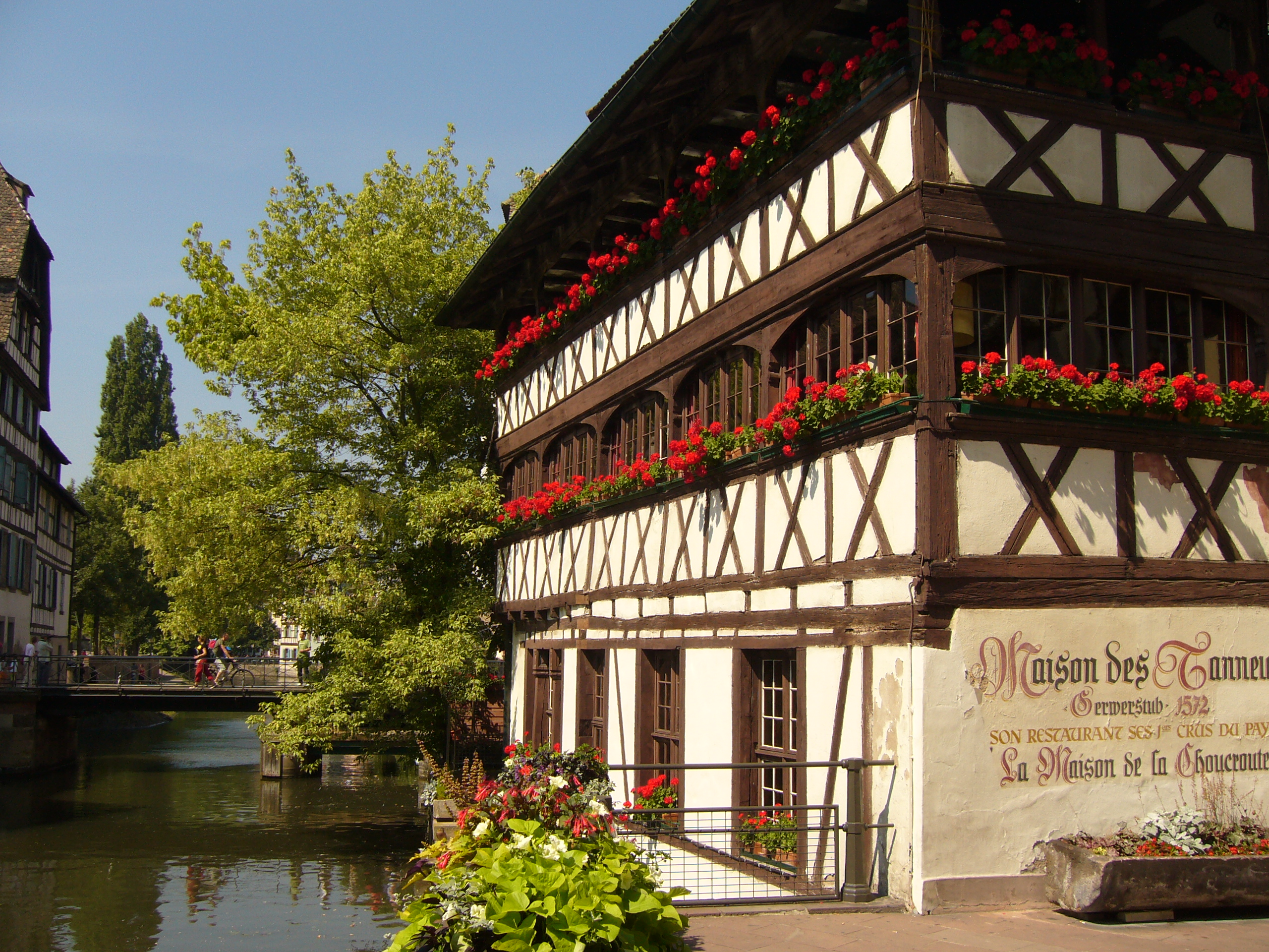 La Maison des tanneurs (Strasbourg)